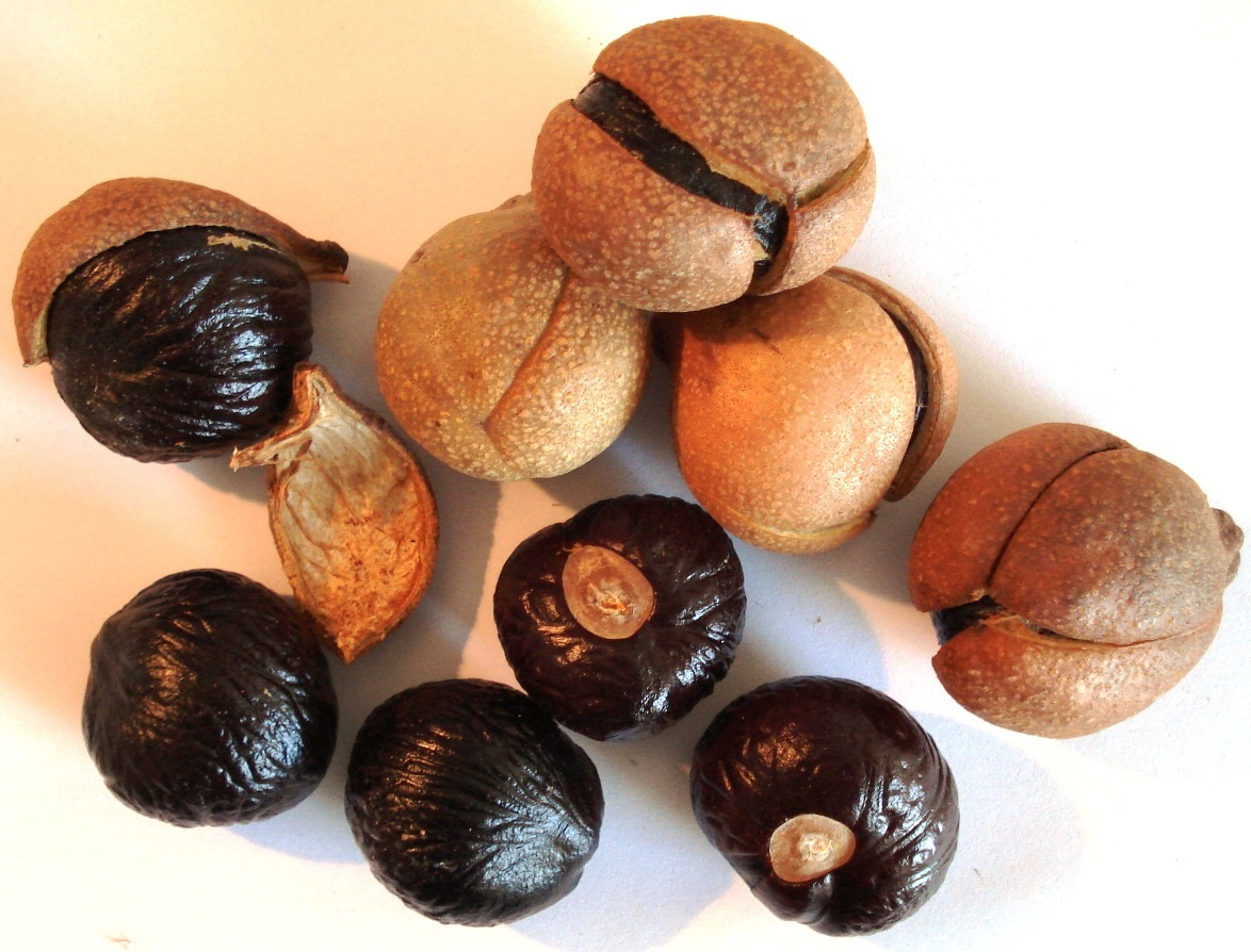 Aesculus indica - Indische Rosskastanie - Fruits / Früchte